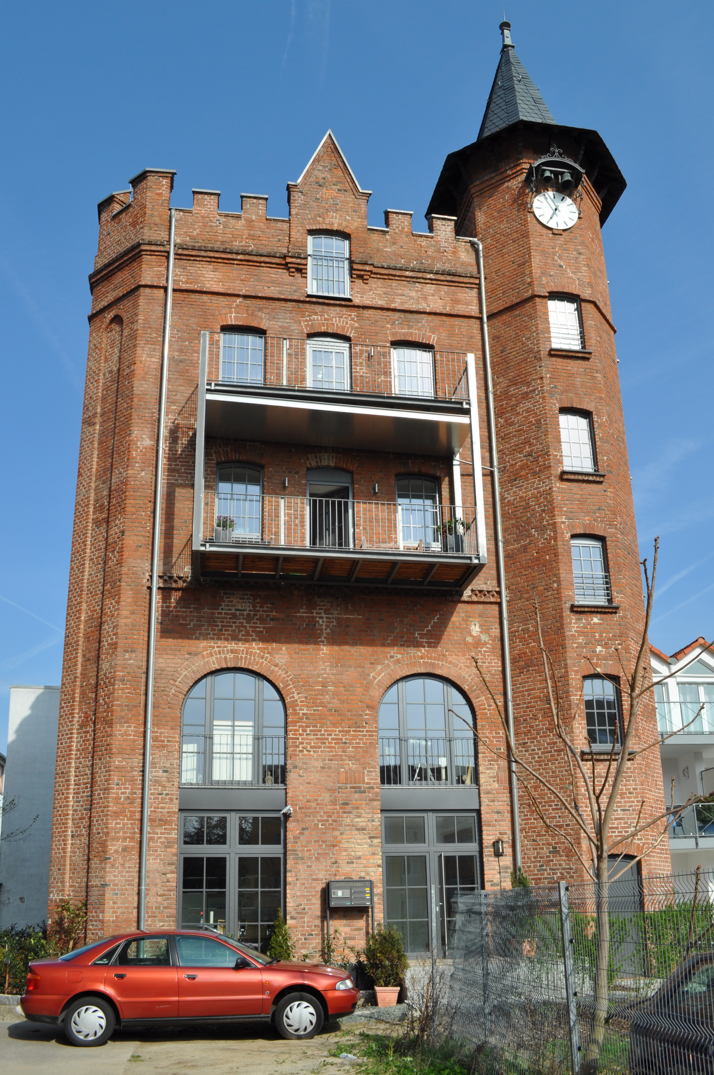 ehemaliger Turm der "Actien-Brauerei Homburg v.d.H. vorm. A. Messerschmidt" in Bad Homburg, Castillostraße 1a